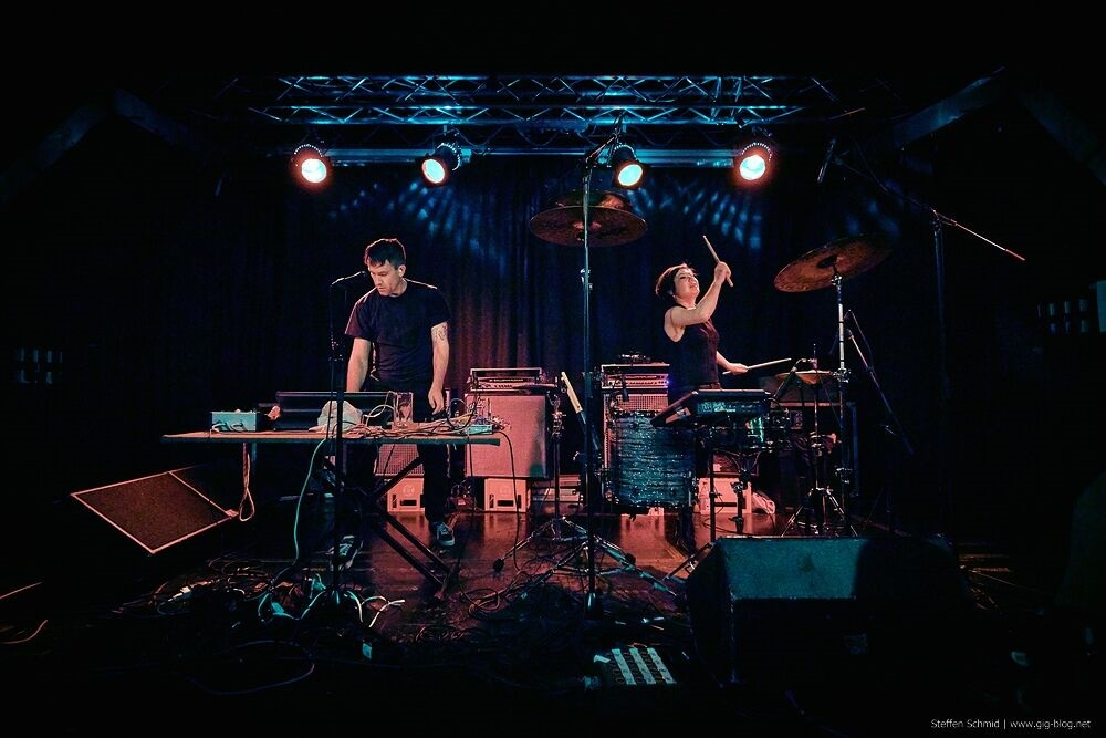 Xiu Xiu im großen Saal des KOMMA